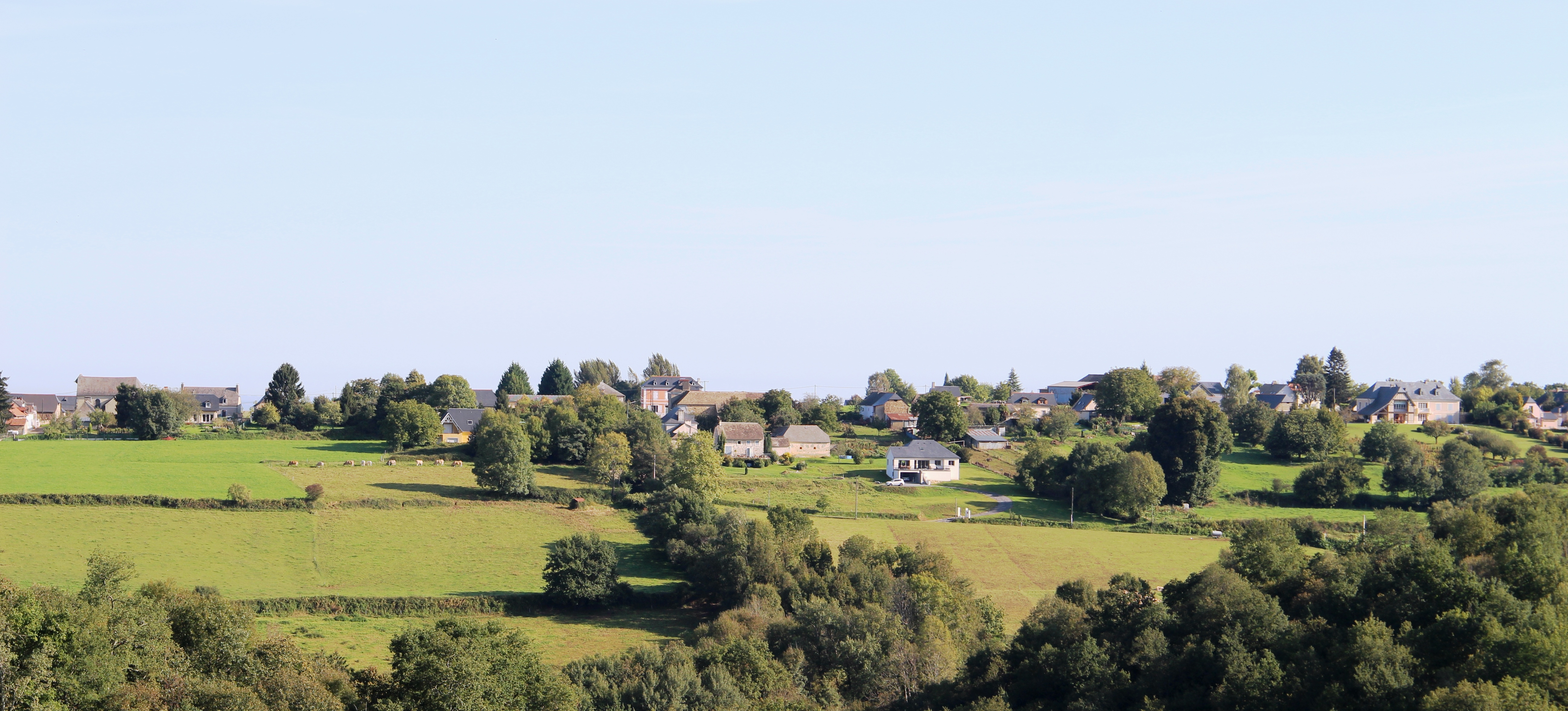 Visker (Hautes-Pyrénées)